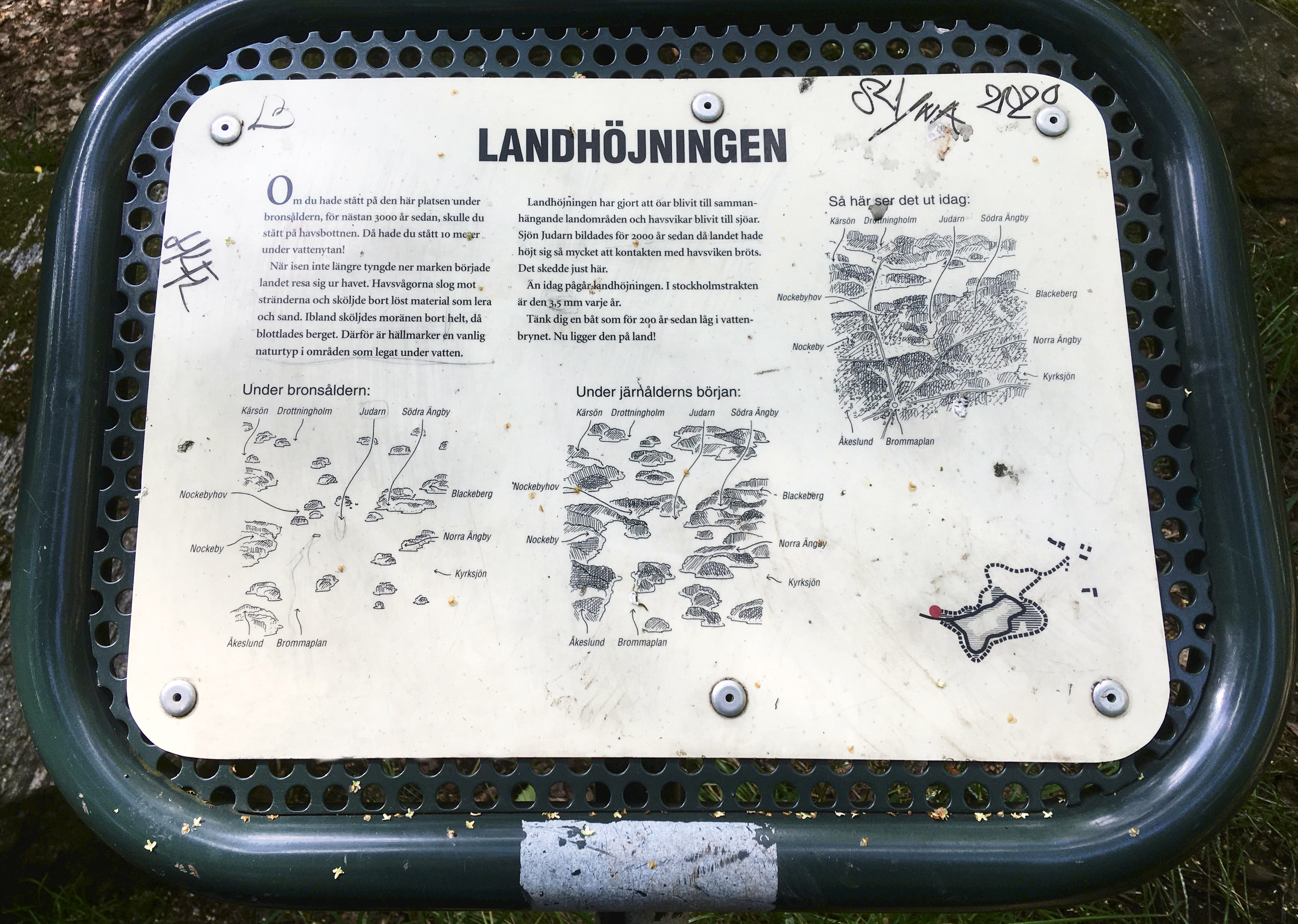 Judarskogens naturstig, skylt "Landhöjningen" uppsatt av Stockholms Gatu- och Fastighetskontor.